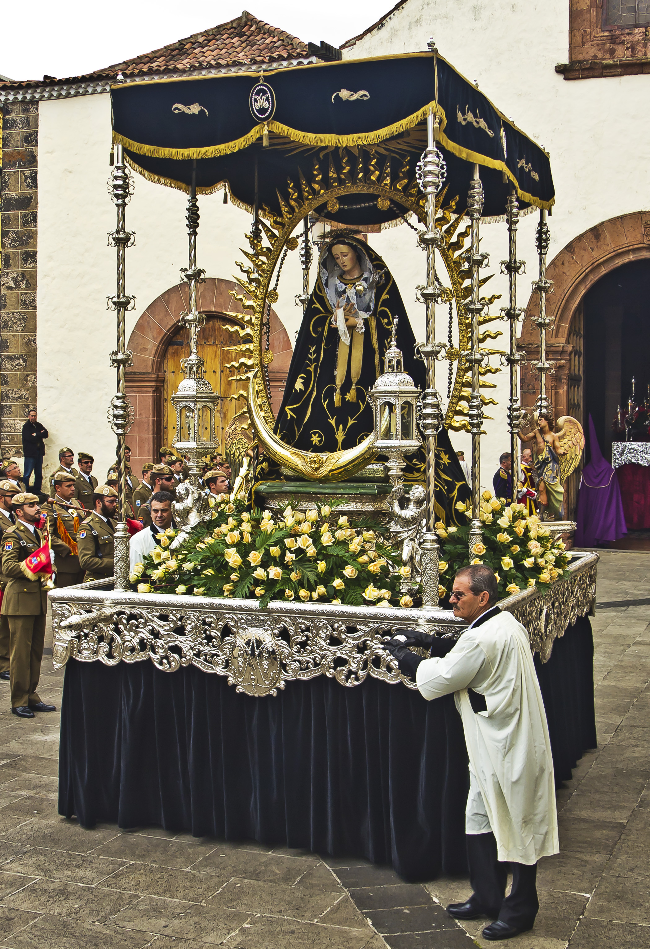 Procesión del Traslado del Santísimo Cristo Difunto desde la Iglesia de Santo Domingo / Paso de Nuestra Señora de La Soledad